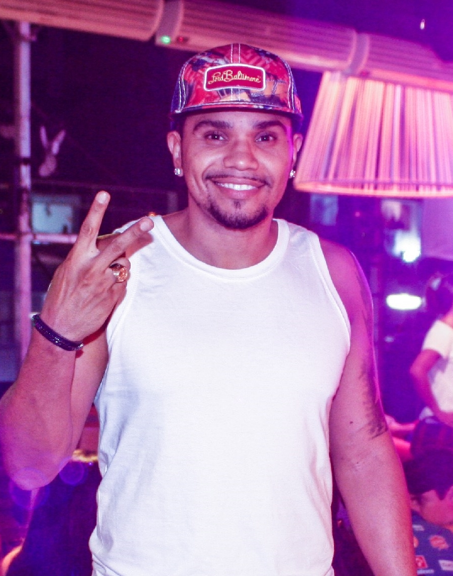 Imagem do cantor Naldo no Carnaval da Bahia.